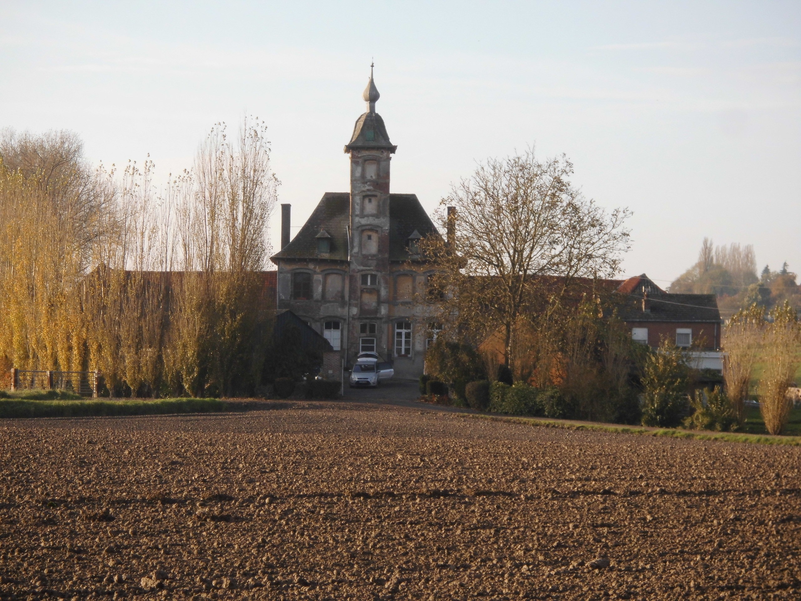 Kasteel Ter Beck - Beekstraat - Elsegem - Wortegem-Petegem - Oost-Vlaanderen - België